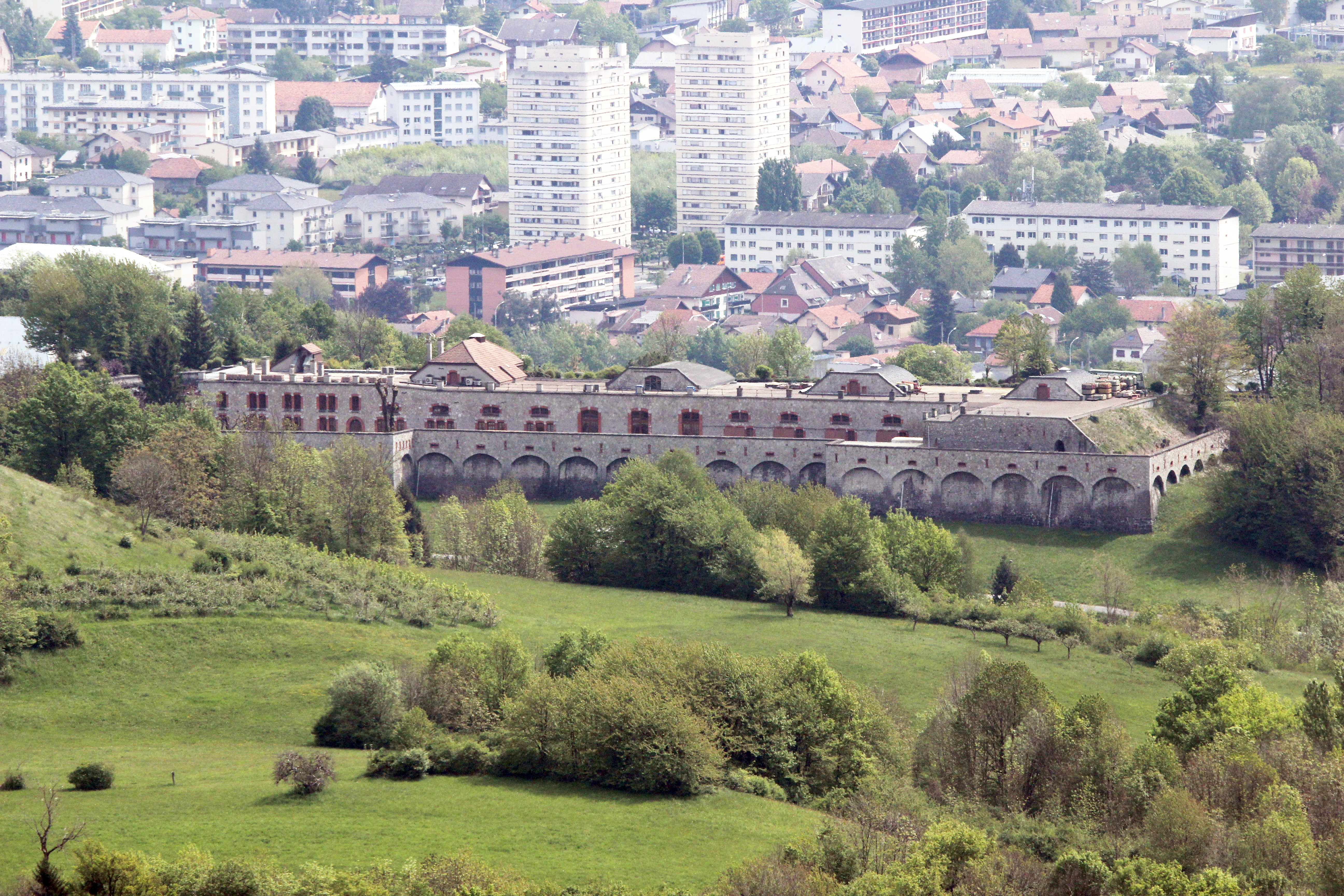 Vue générale du fort de Villard